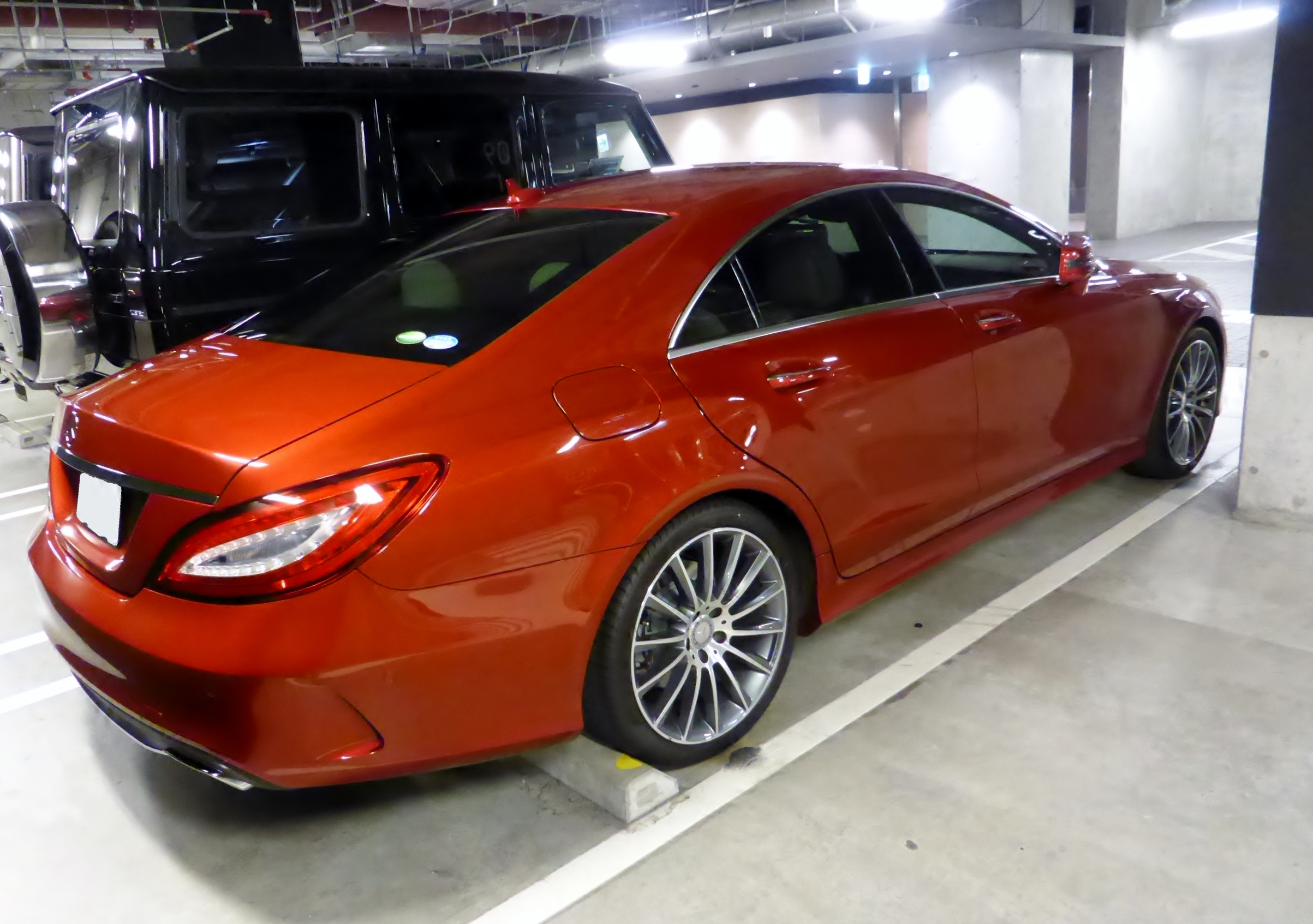 C218型メルセデス・ベンツCLS550をリアから撮影。